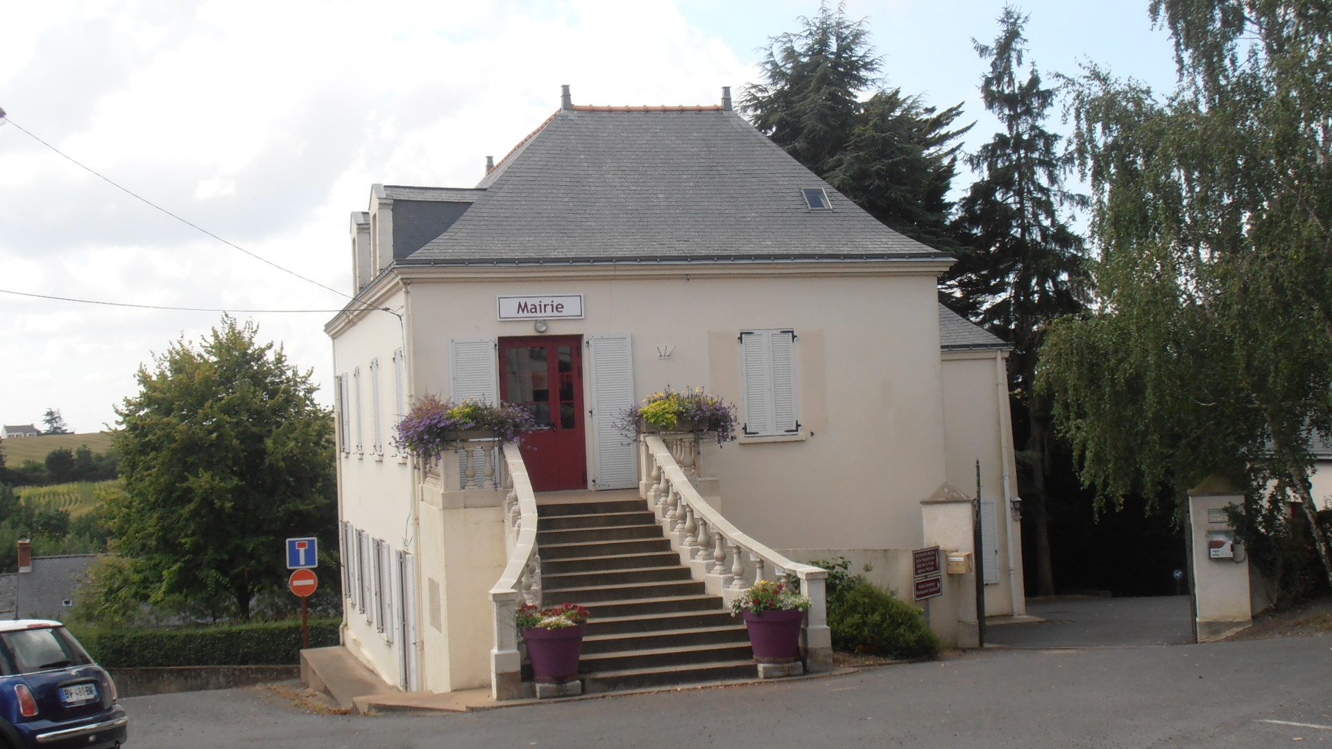 La mairie et sur la droite le foyer des jeunes